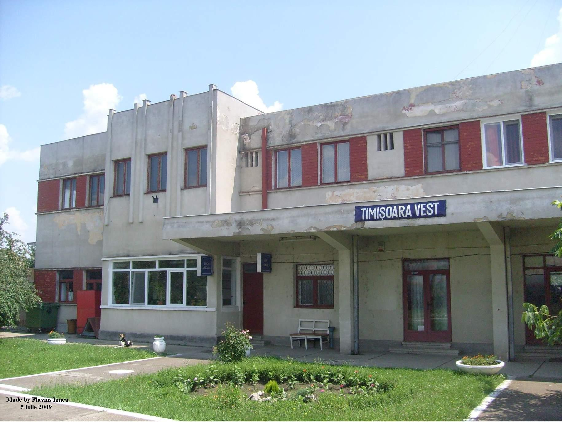 Gara Timisoara Vest